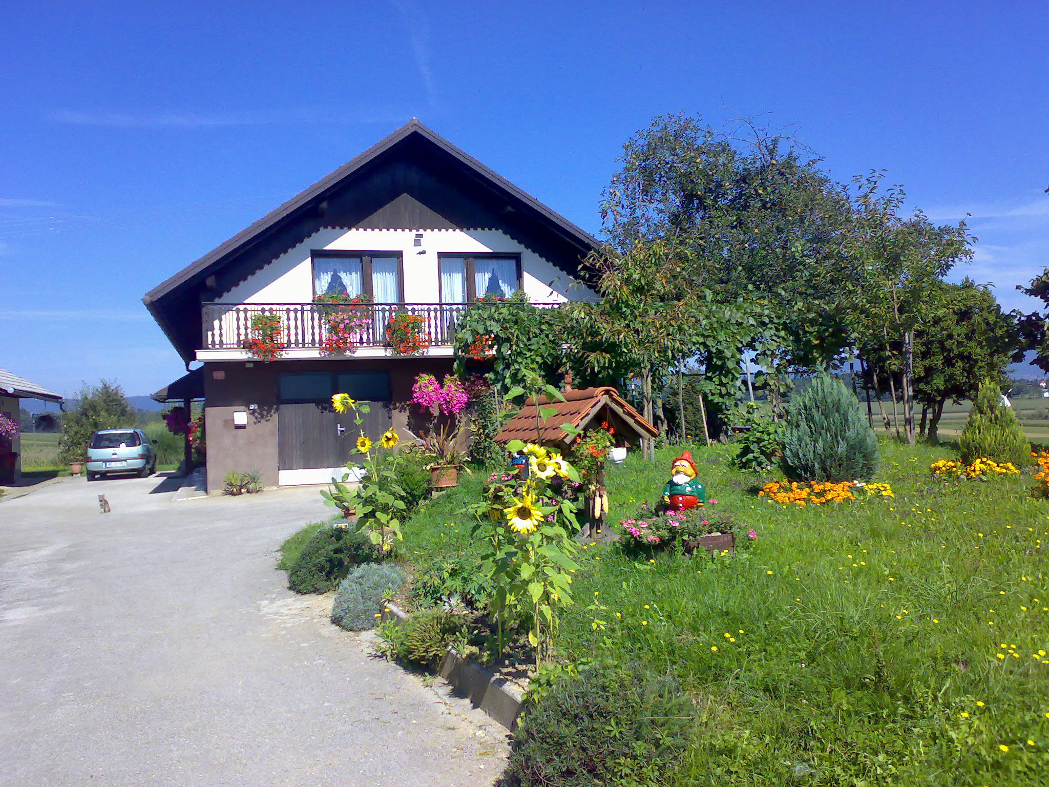 Hiša v vasi Boršt